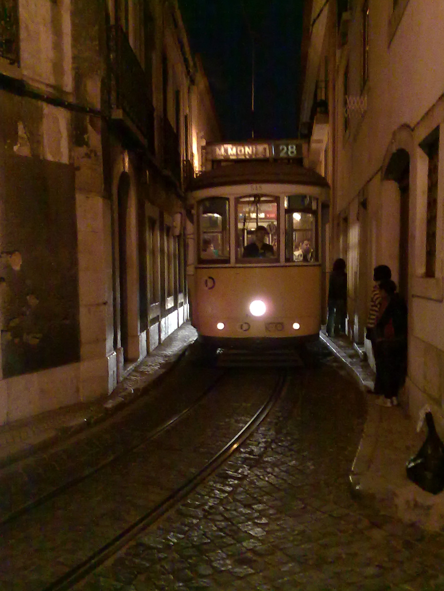 Altbautriebwagen der Linie 28E der Straßenbahn Lissabon durchfährt die Rua das Escolas Gerais im Stadtteil Alfama.